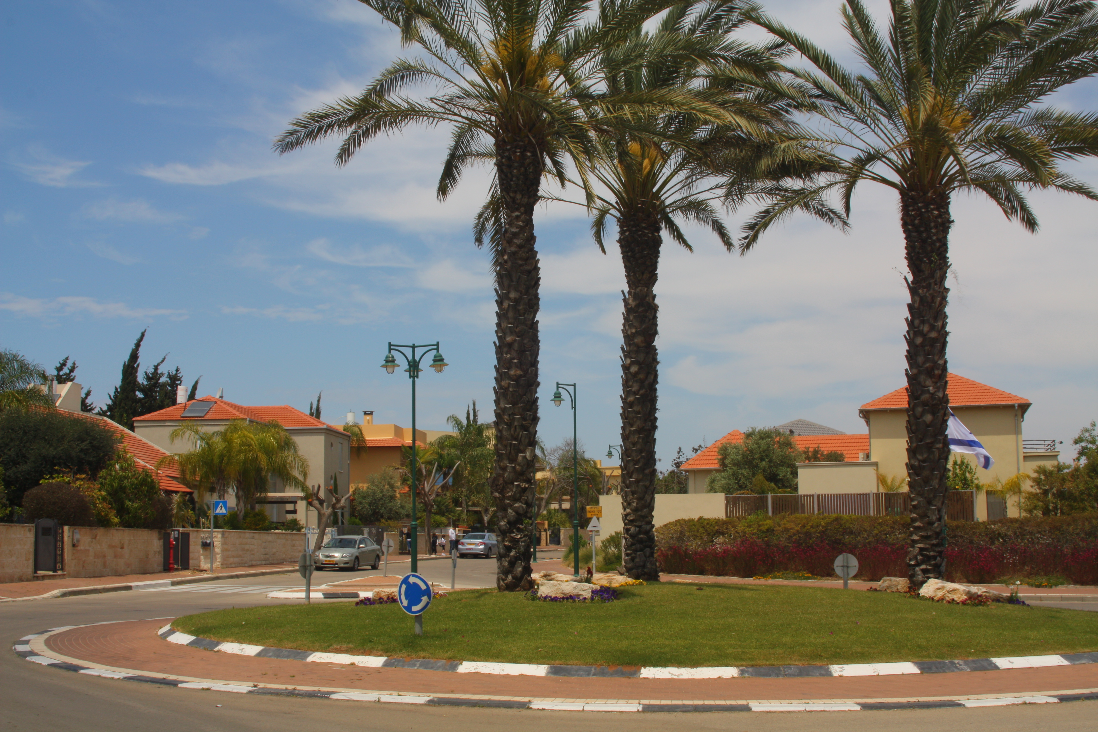 הכיכר בכניסה לבת חן Entrance to Bat Hen